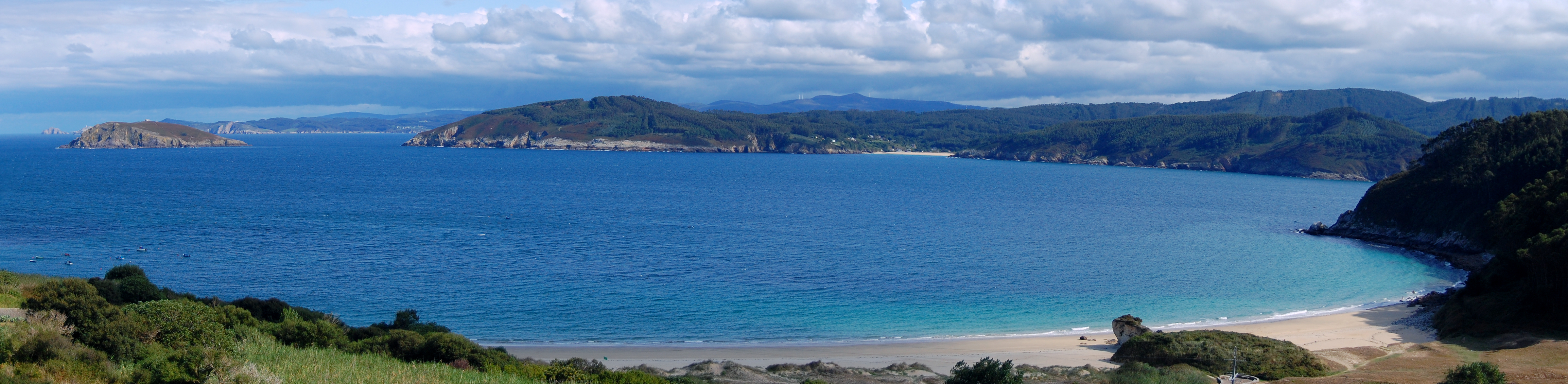 Praia de Bares e ría do Barqueiro vista dende a parroquia de Bares, en Mañón. This is a photography of a Special Area of Conservation in Spain with the ID: ES1110010. Natura2000 entry, EEA entry This is a photography of a Special Area of Conservation in Spain with the ID: ES1120017. Natura2000 entry, EEA entry